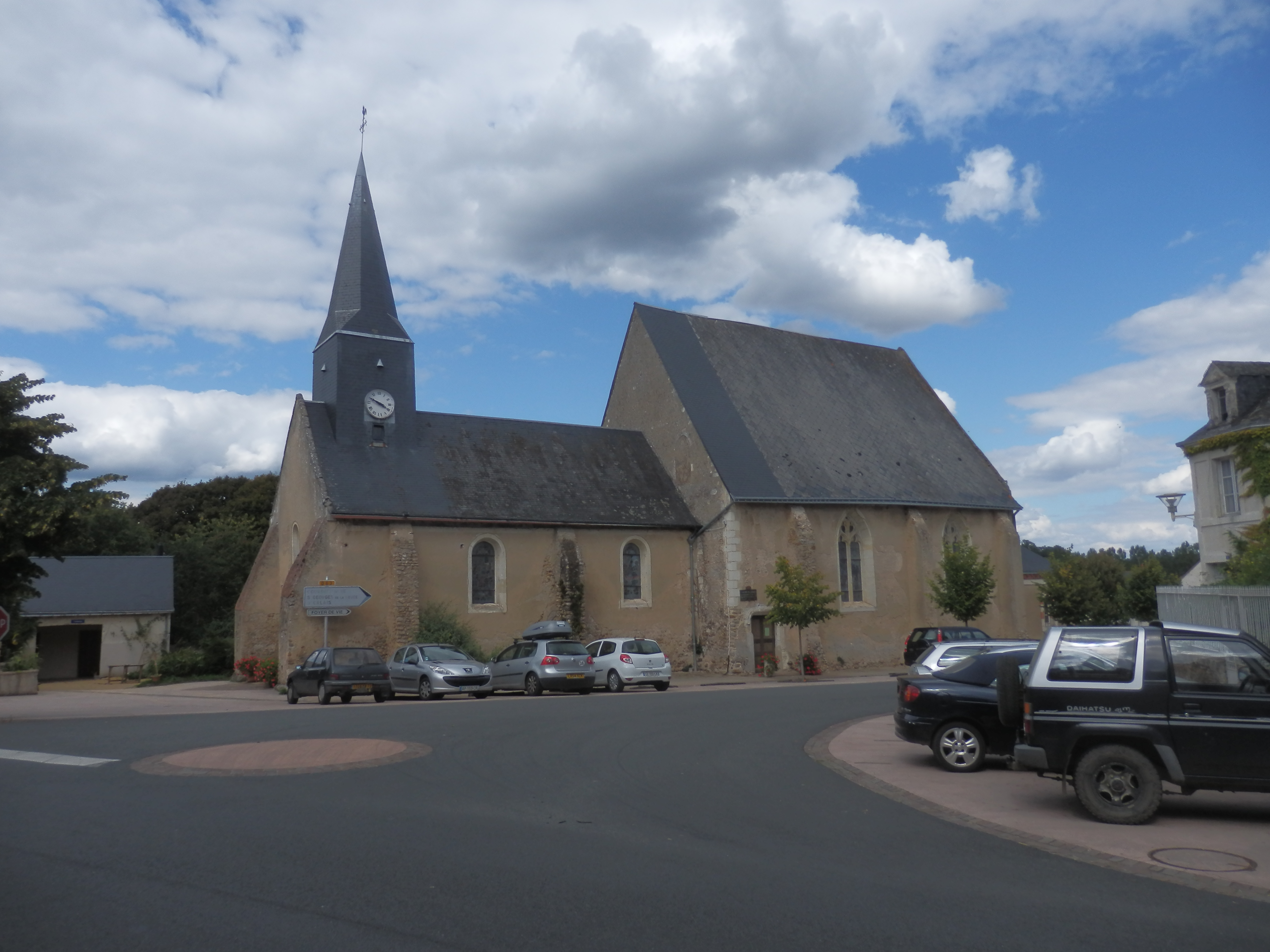 Vue de l'église Saint-Pierre.